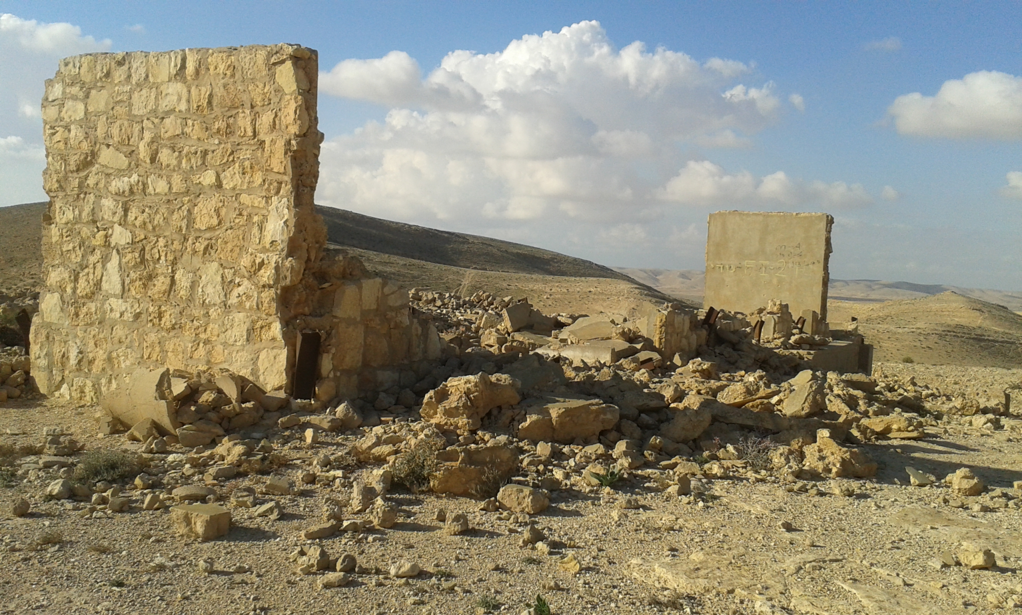 מחנה קידוחי הנפט לייד הר אבנון